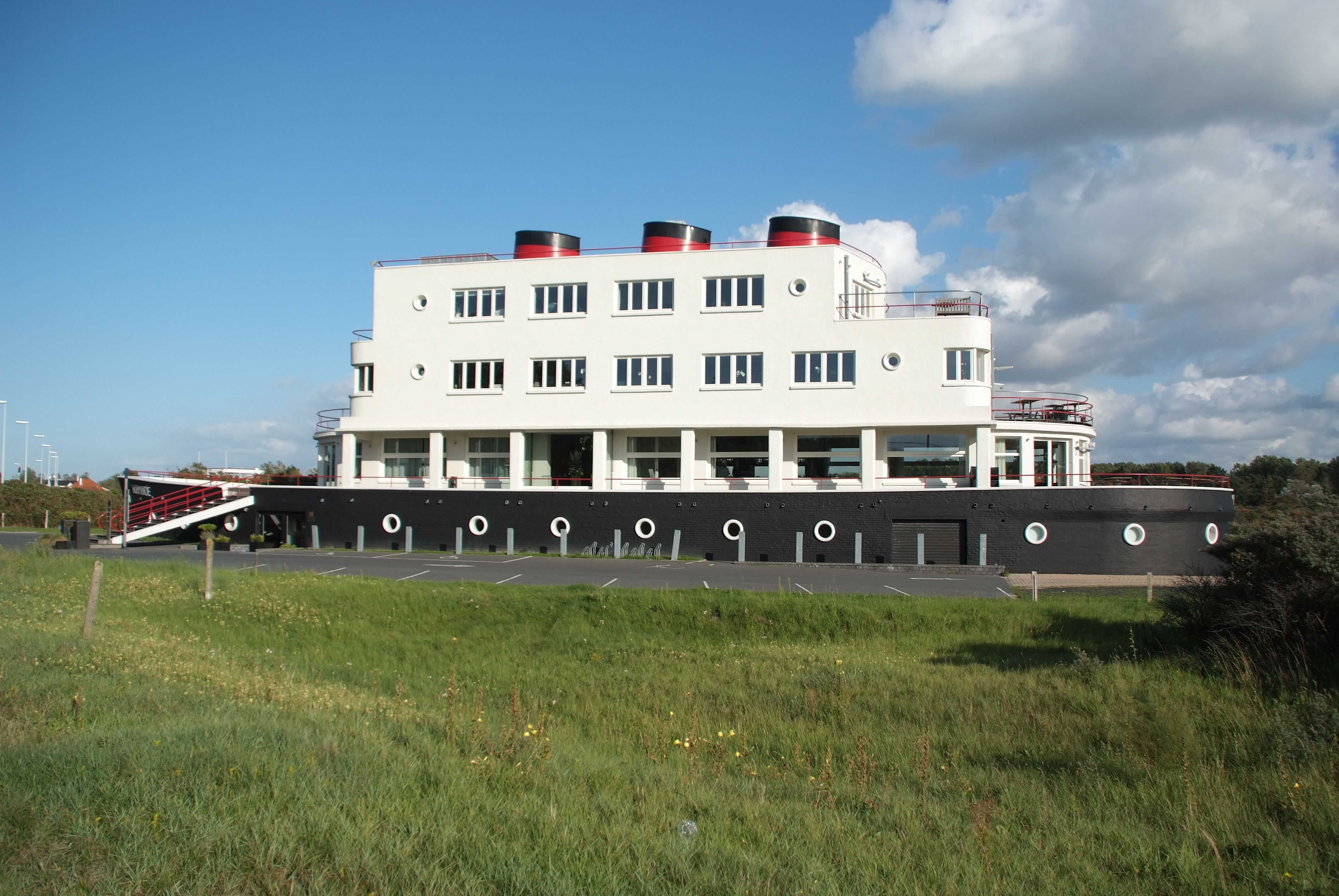 Hotel Normandie, West-Vlaanderen, Koksijde